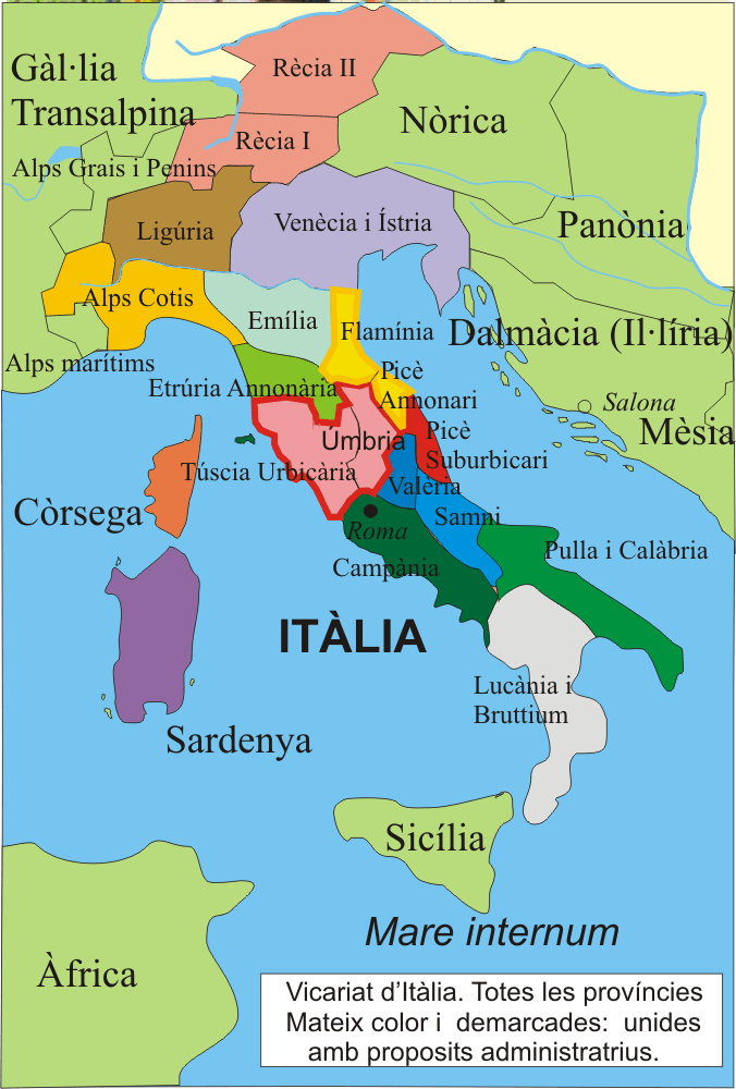 Províncies d'Itàlia en temps de Constantí el gran, amb les províncies unides temporalment a efectes administratius